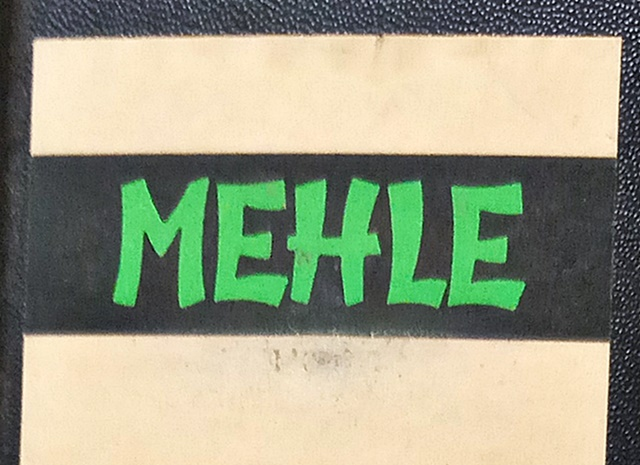 Mehle Firmenemblem, Göttingen (Gründer Emil Mehle 1868-1960 von Grünstadt). Eigenes Bild von eigenem altem Ordner.